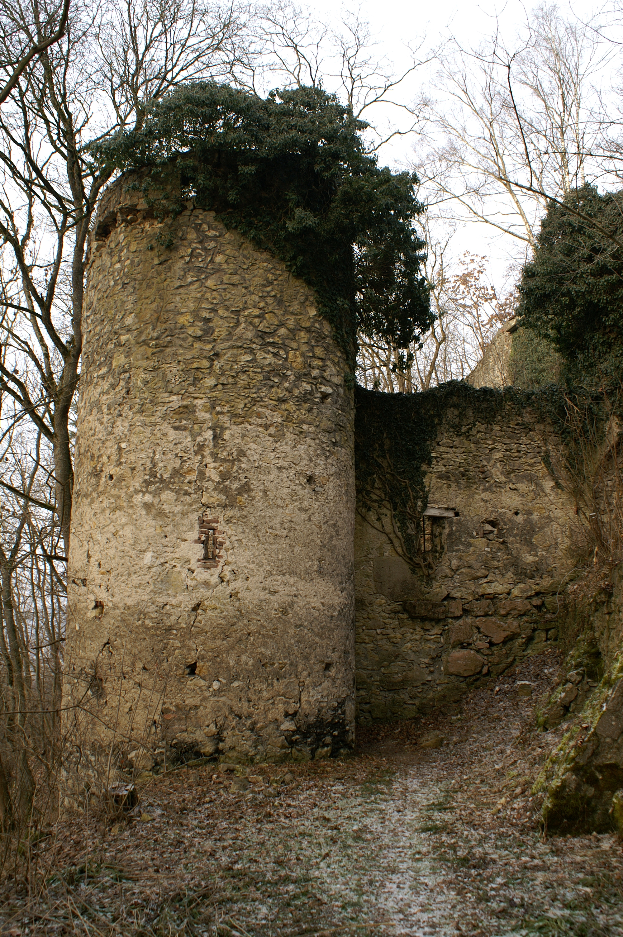 Dieser Turm am südöstlichen Rand der Burg Klingenstein ist noch gut erhalten